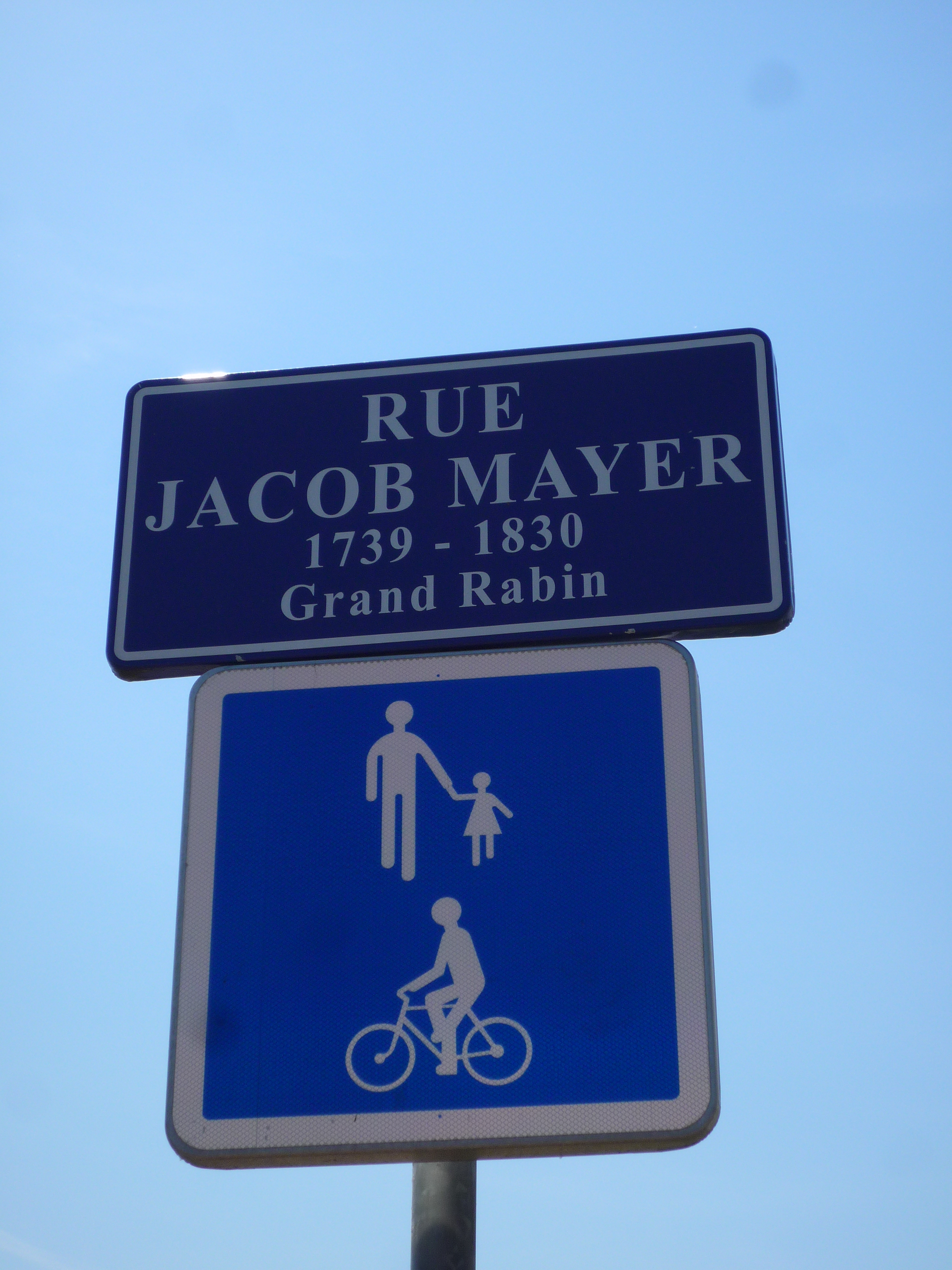 Plaque de rue voulant honorer Jacob Meyer, grand rabbin de Strasbourg. Cette plaque présente des fautes d'orthographe : il s'agit en fait de Jacob Meyer, grand-rabbin de Strasbourg (1739-1830)